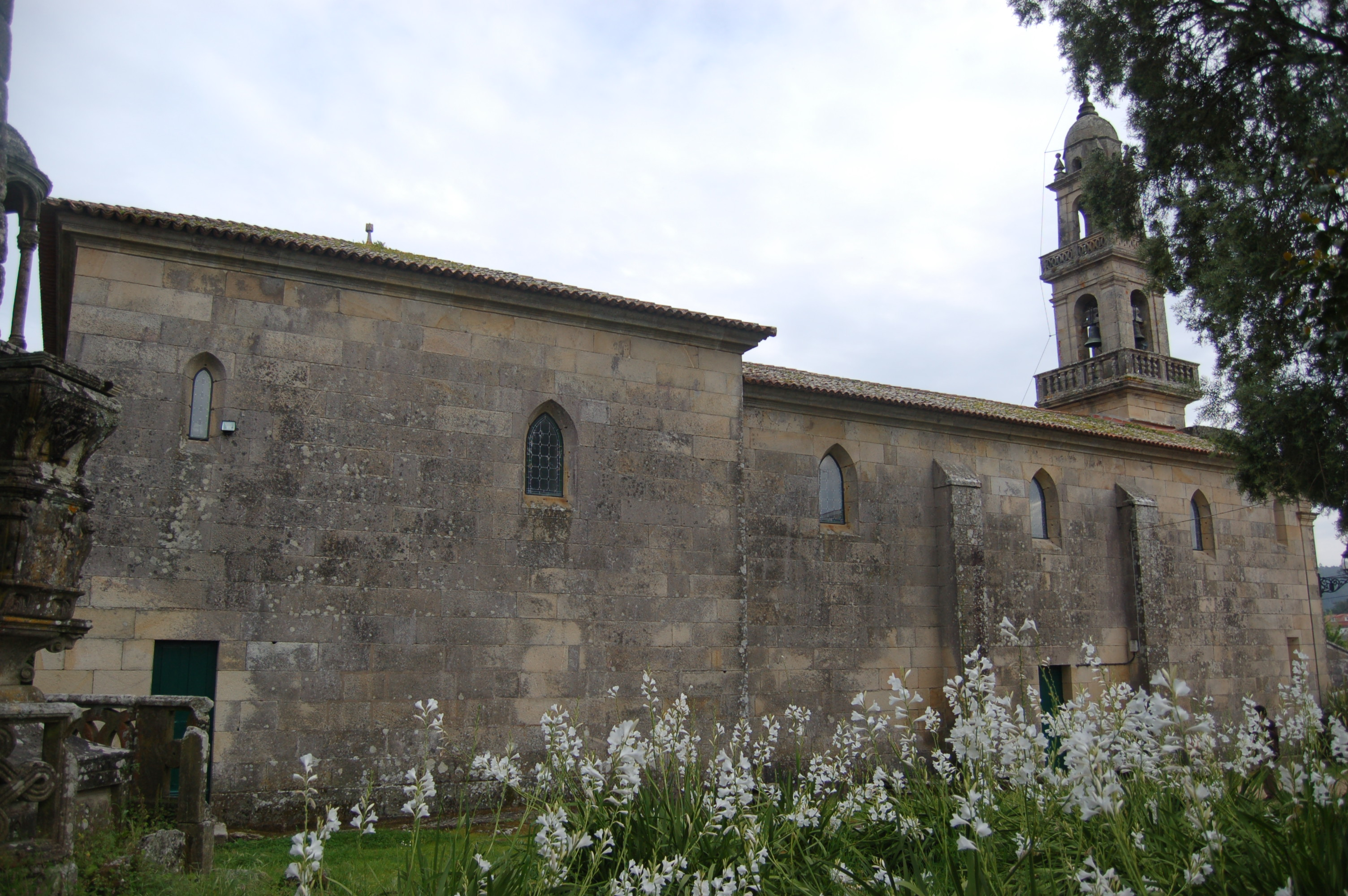 Igrexa parroquial de San Cibrán de Aldán (Cangas)